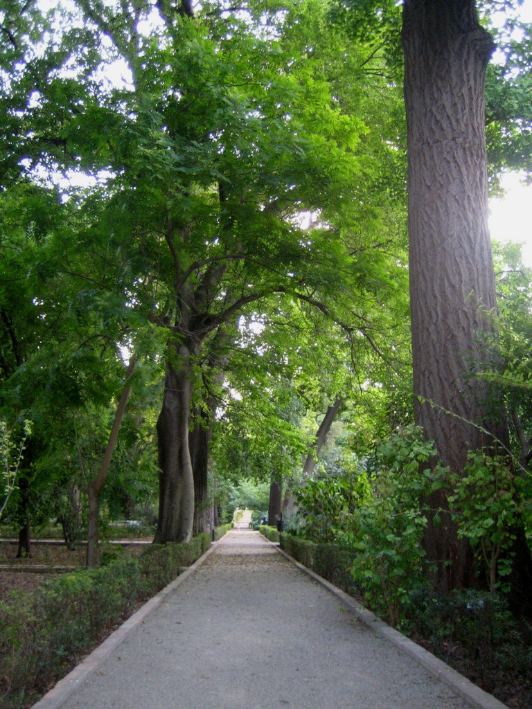 Jardín botánico de Valencia. España